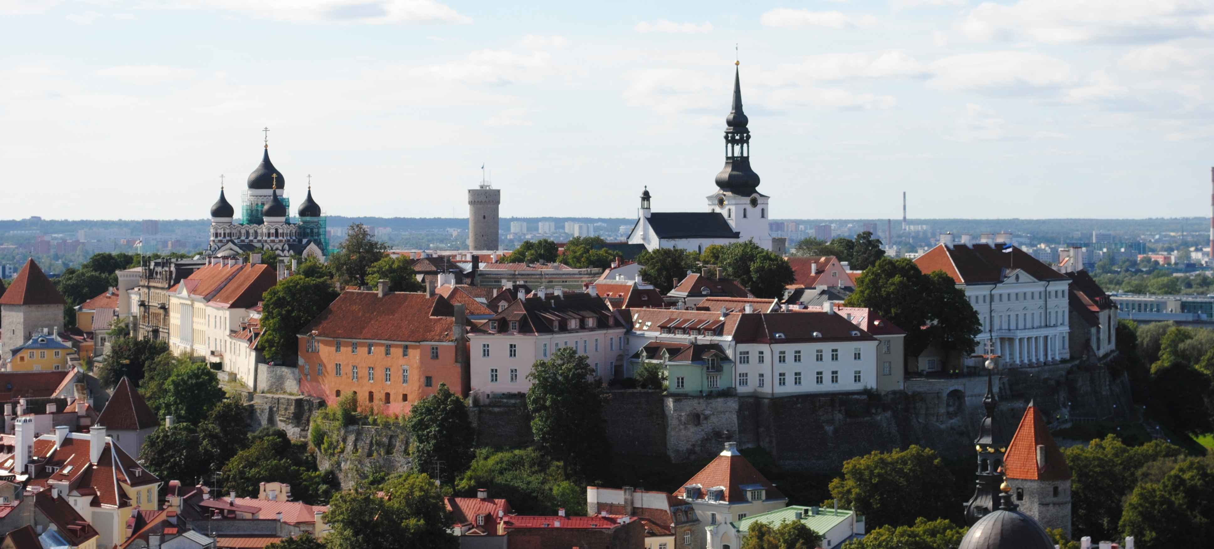 Der Domberg in Tallinn